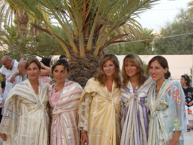 Femmes tunisiennes portant un houli de Djerba